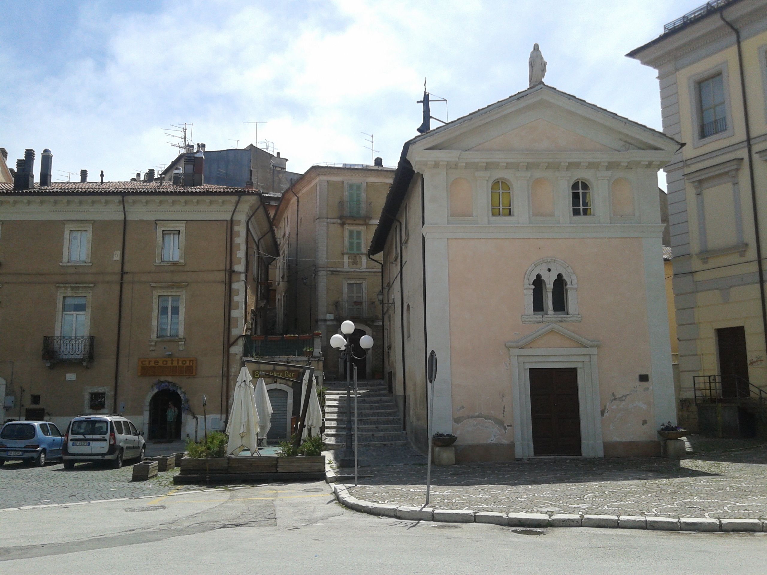 Scorcio fotografico di Rocca di Mezzo